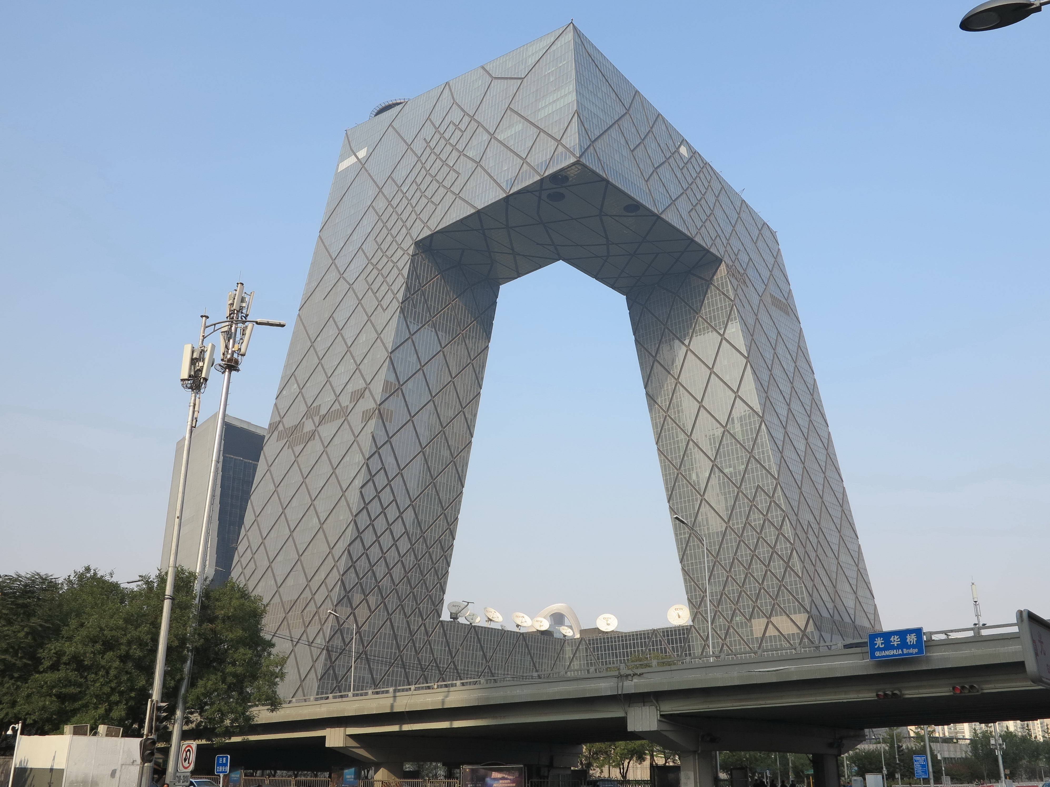 北京 中央电视台新址